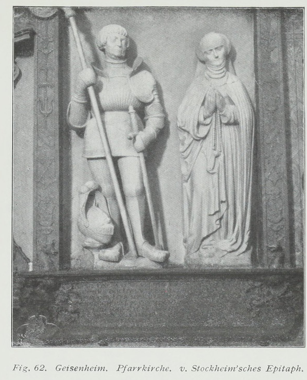 Geisenheim Pfarrkirche v Stockheimsches Epitaph. Doppelgrabmal Friedrich von Stockheim (1462–1528) und Ehefrau Irmel von Karben (1484–1529).